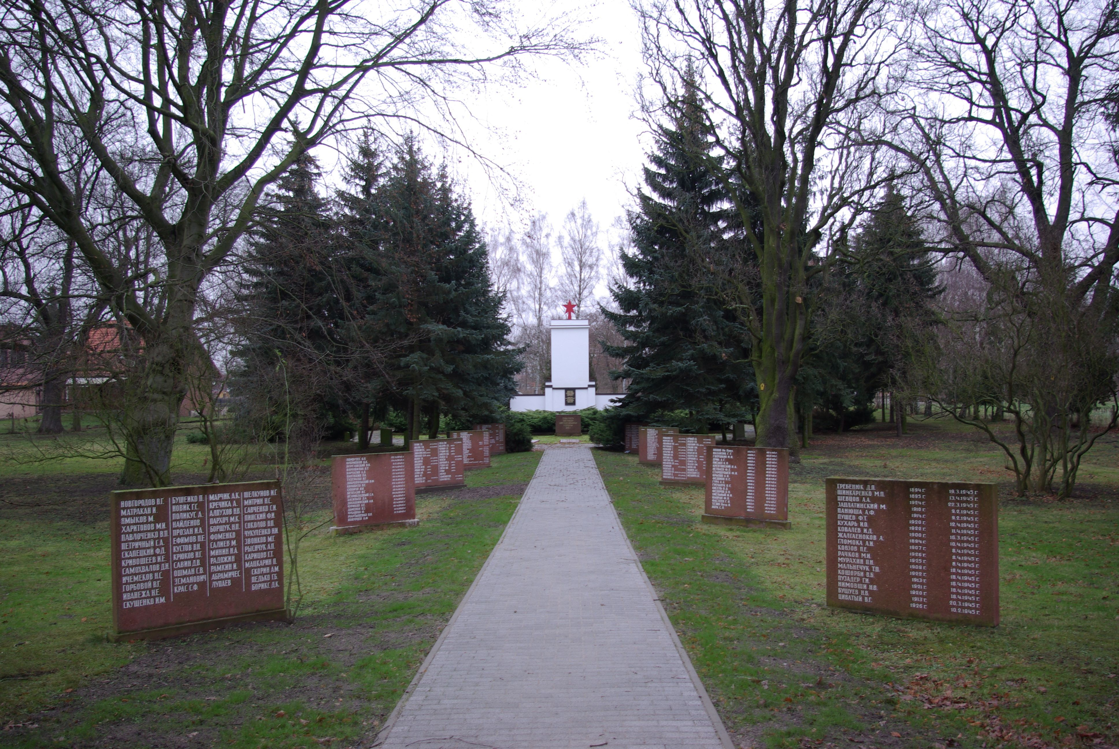 Reitwein in Brandenburg. Die Sowjetische Kriegsgräberstätte Reitwein ist ein Friedhof für etwa 3000 Gefallene des Zweiten Weltkriegs. Der Friedhof steht unter Denkmalschutz.